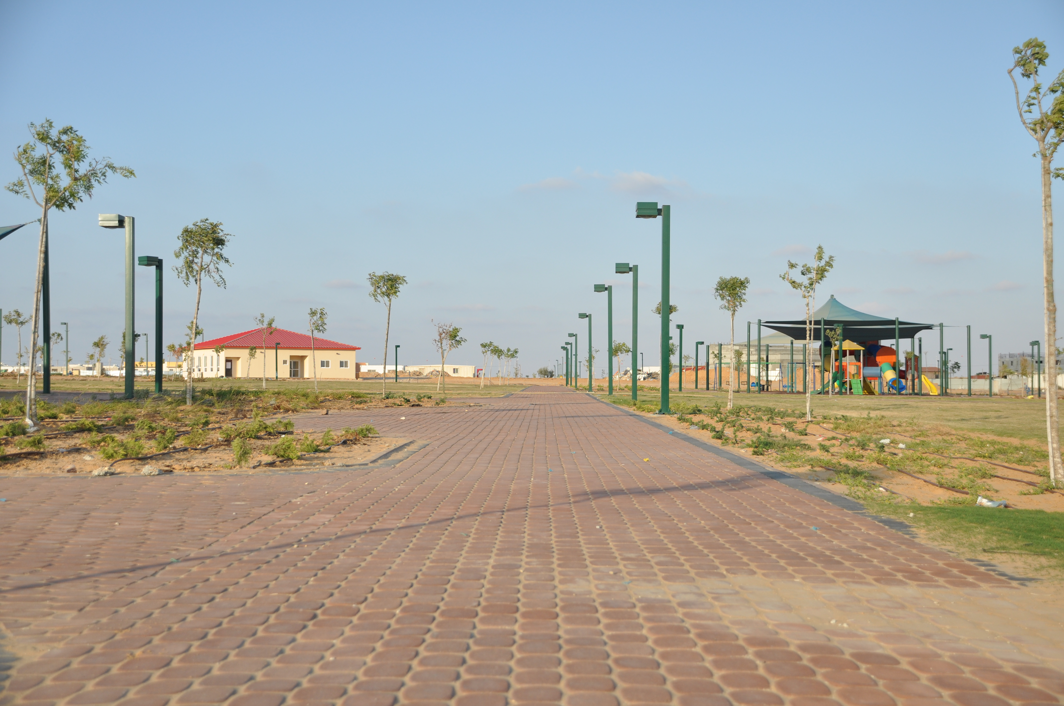 השטח הציבורי במרכז נווה. המבנה בשמאל התמונה למעלה הוא בית הכנסת הזמני